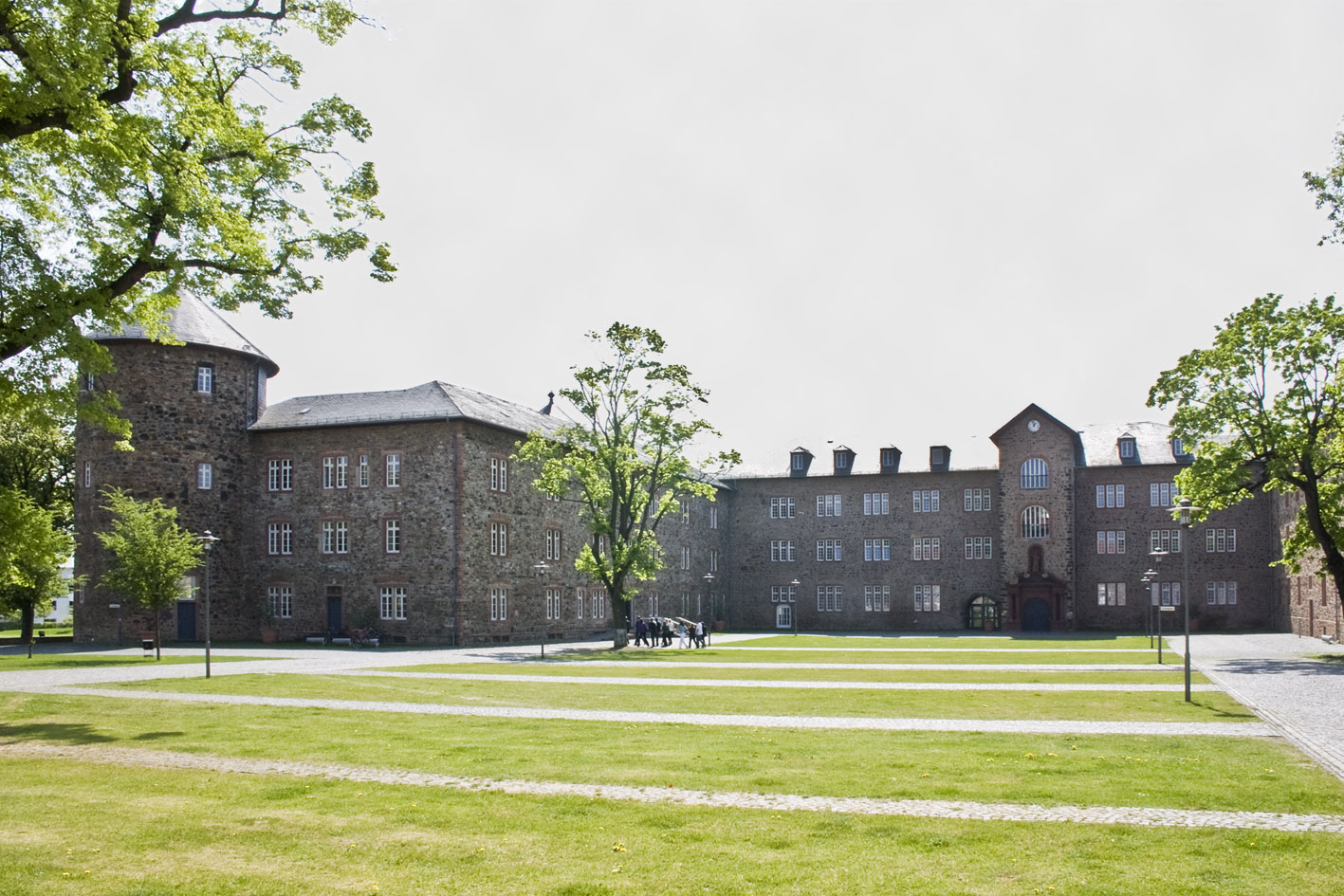 Schloss des Landgrafen Philipp von Hessen-Butzbach in Butzbach